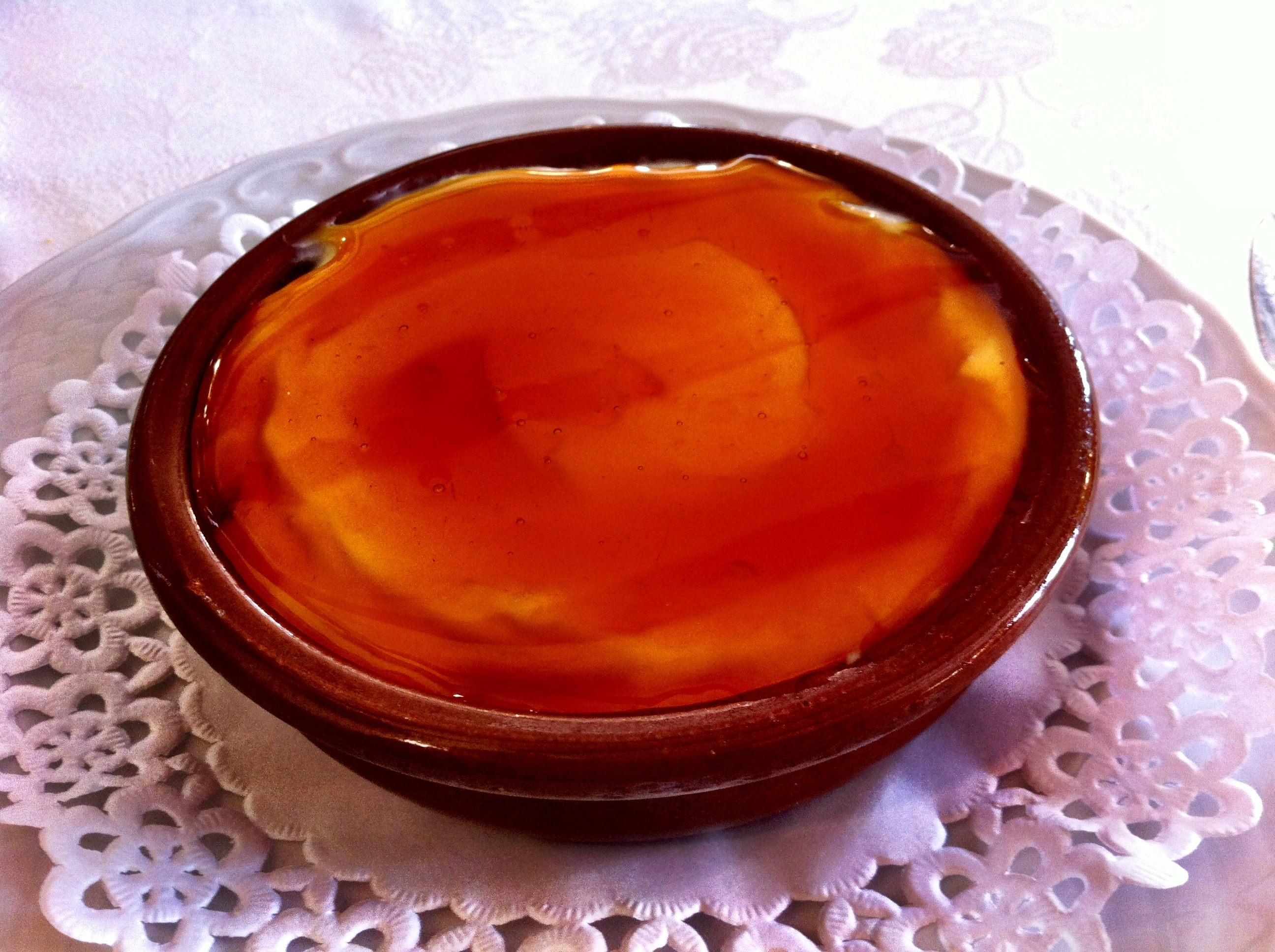 Goxua